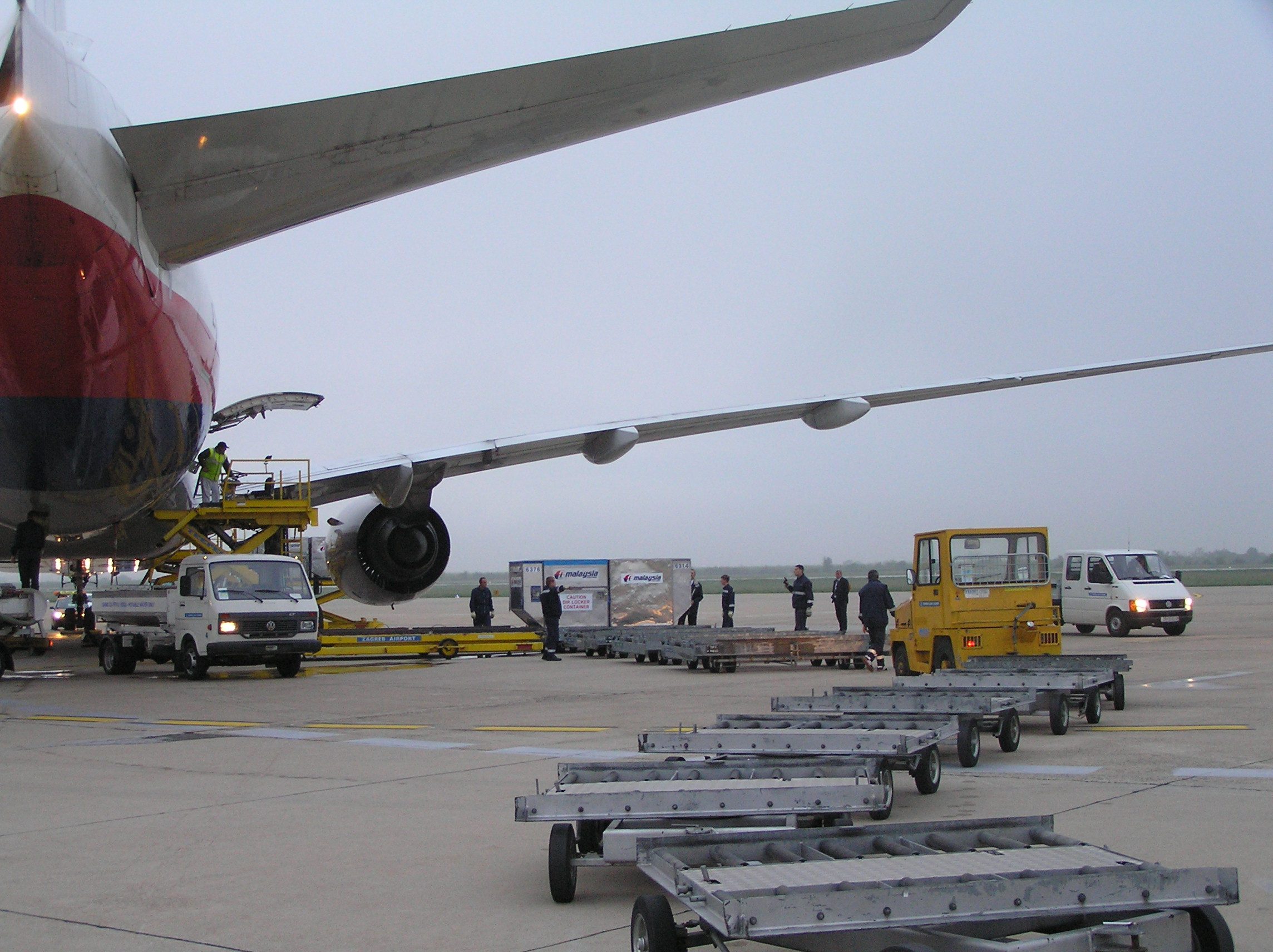 Airport equpment